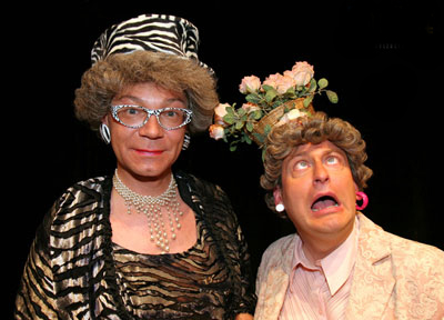 Waltraud und Mariechen, alias Volker Heißmann und Martin Rassau. Zwei Komödianten aus Fürth.